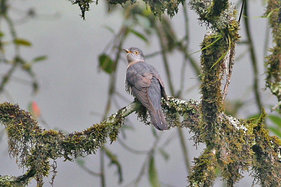 Himalayan Cuckoo Cuculus saturatus, Yongkola, Bhutan